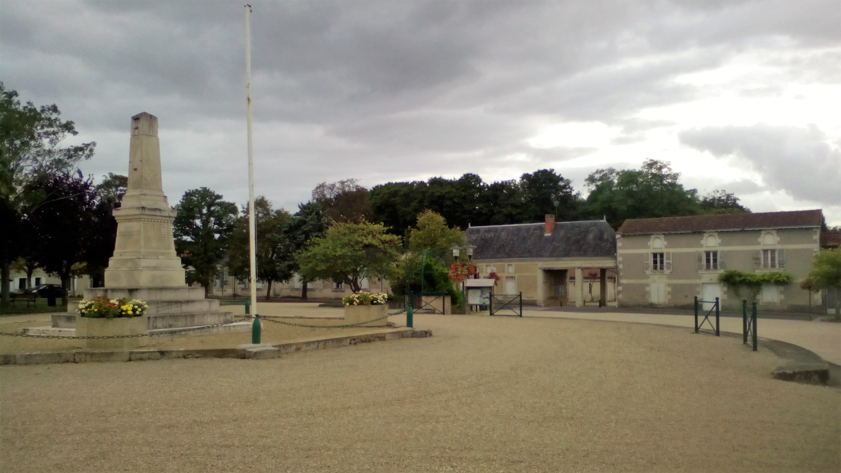 Place du bourg de Beaumont sur la commune de Beaumont-Saint-Cyr avec vu sur le moinument aux morts et sur sa salle des fêtes